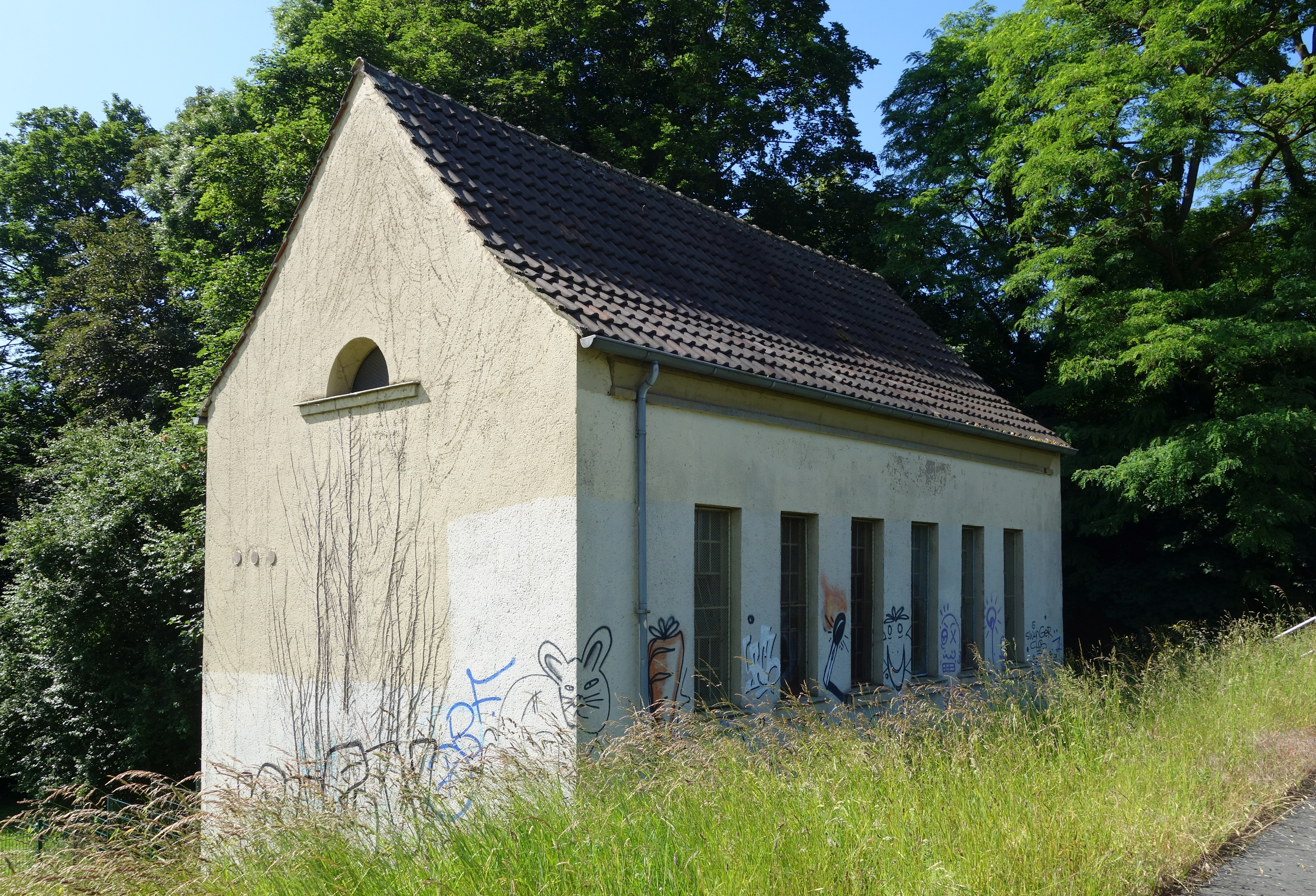 Pumpstation Herbert-Eulenberg-Weg 8 (Düsseldorf), 2019. Pumpstation Herbert-Eulenberg-Weg 8 (Düsseldorf), 2019 (02).jpg Pumpstation Herbert-Eulenberg-Weg 8 (Düsseldorf), 2019 (03).jpg Pumpstation Herbert-Eulenberg-Weg 8 (Düsseldorf), 2019 (04).jpg Pumpstation Herbert-Eulenberg-Weg 8 (Düsseldorf), 2019 (05).jpg Pumpstation Herbert-Eulenberg-Weg 8 (Düsseldorf), 2019 (06).jpg